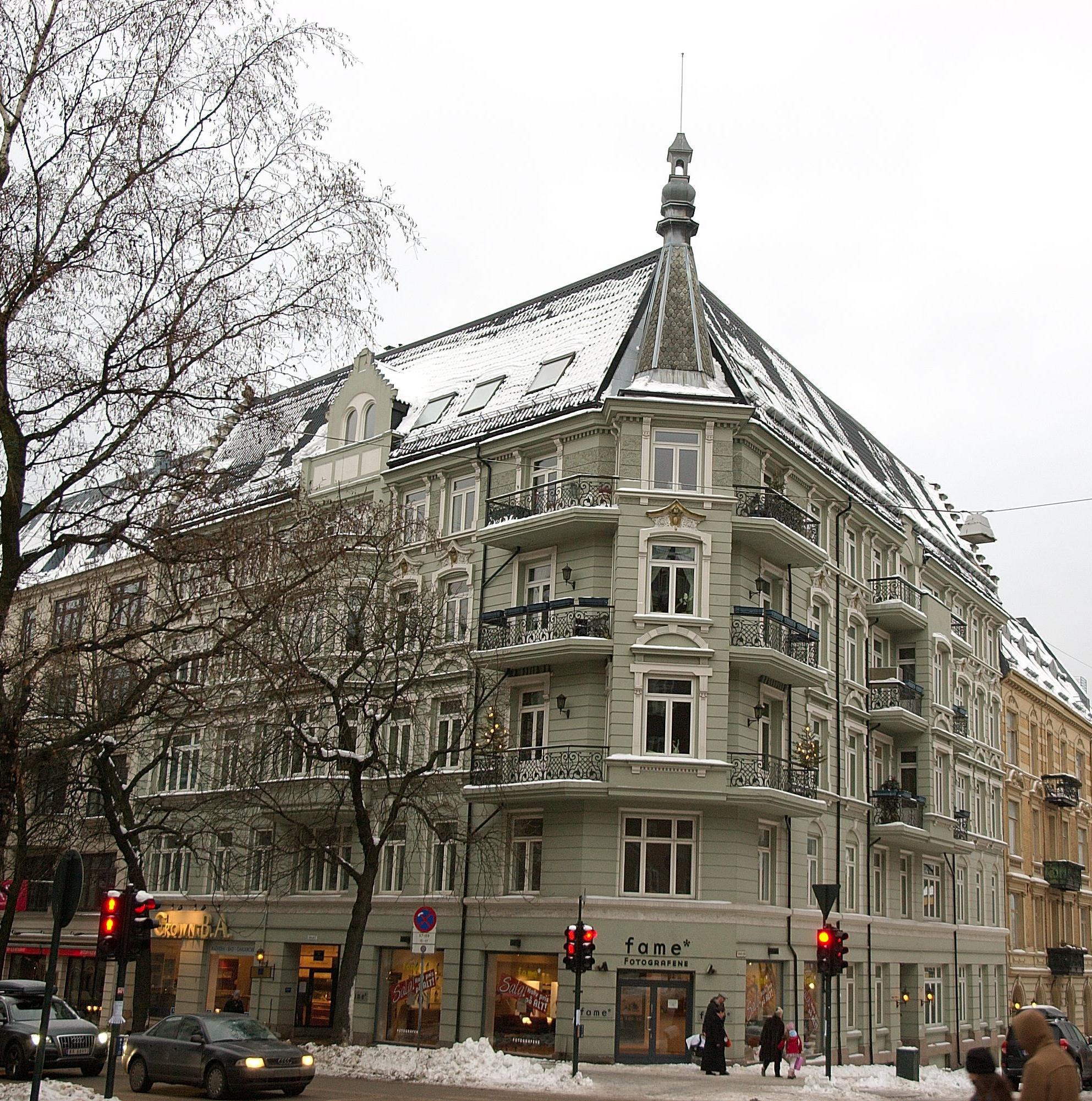 Gabels gate 43 på Frogner i Oslo, fra 1898. Arkitekt Georges Heinecke.